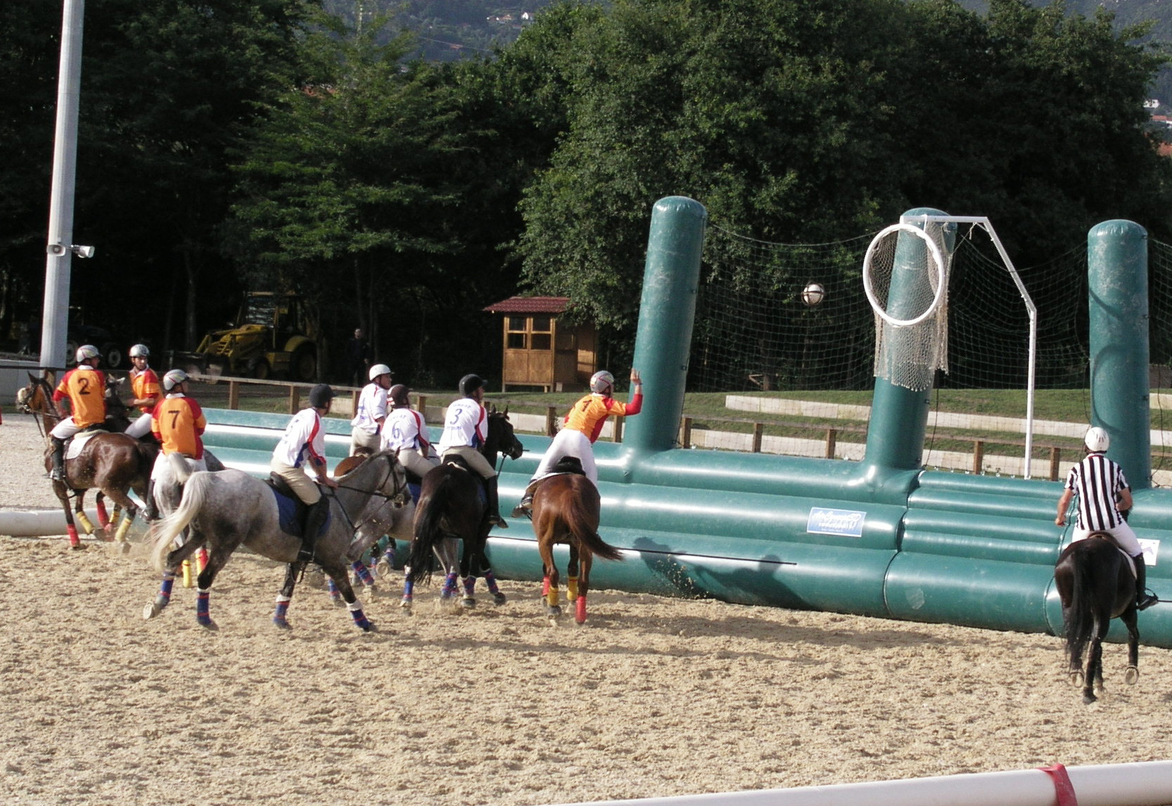 FIHB-Horsball World Cup: Campenato do Mundo, Espanha - Inglaterra, Ponte de Lima 2008, Portugal